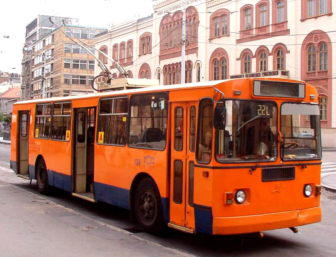 Trolejbus. Fotografisao Goldfinger. U javnoj upotrebi!